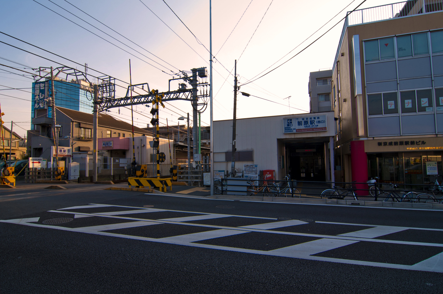 新京成電鉄新京成線前原駅駅前より